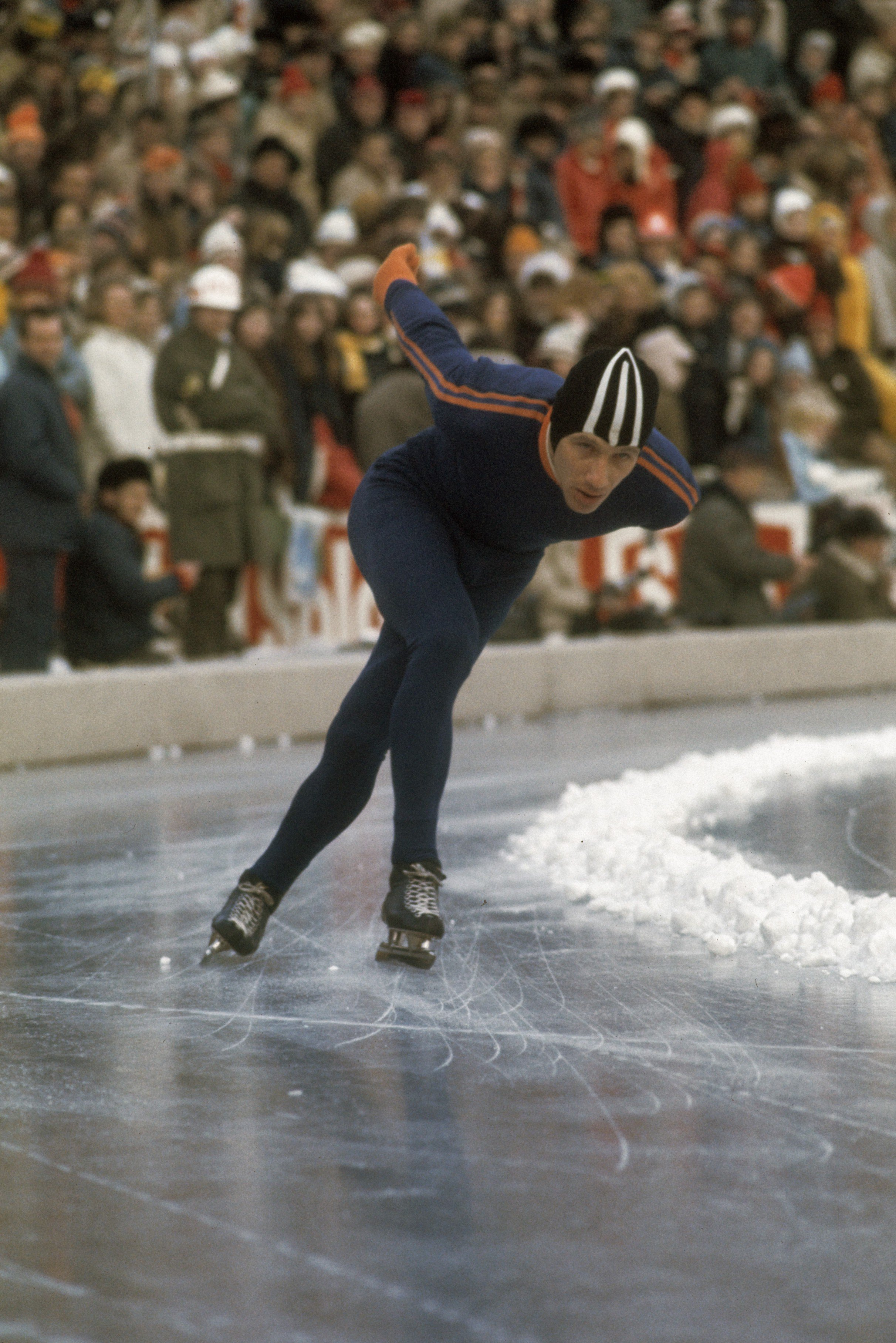 Collectie / Archief : Fotocollectie Anefo Reportage / Serie : [ onbekend ] Beschrijving : Wereldkampioenschappen schaatsen mannen allround in Oslo. Kees Verkerk in actie Datum : 20 februari 1972 Locatie : Noorwegen, Oslo Trefwoorden : schaatsen, schaatsers, sport Persoonsnaam : Verkerk, Kees Fotograaf : Verhoeff, Bert / Anefo Auteursrechthebbende : Nationaal Archief Materiaalsoort : Dia (kleur) Nummer archiefinventaris : bekijk toegang 2.24.01.06 Bestanddeelnummer : 254-9159